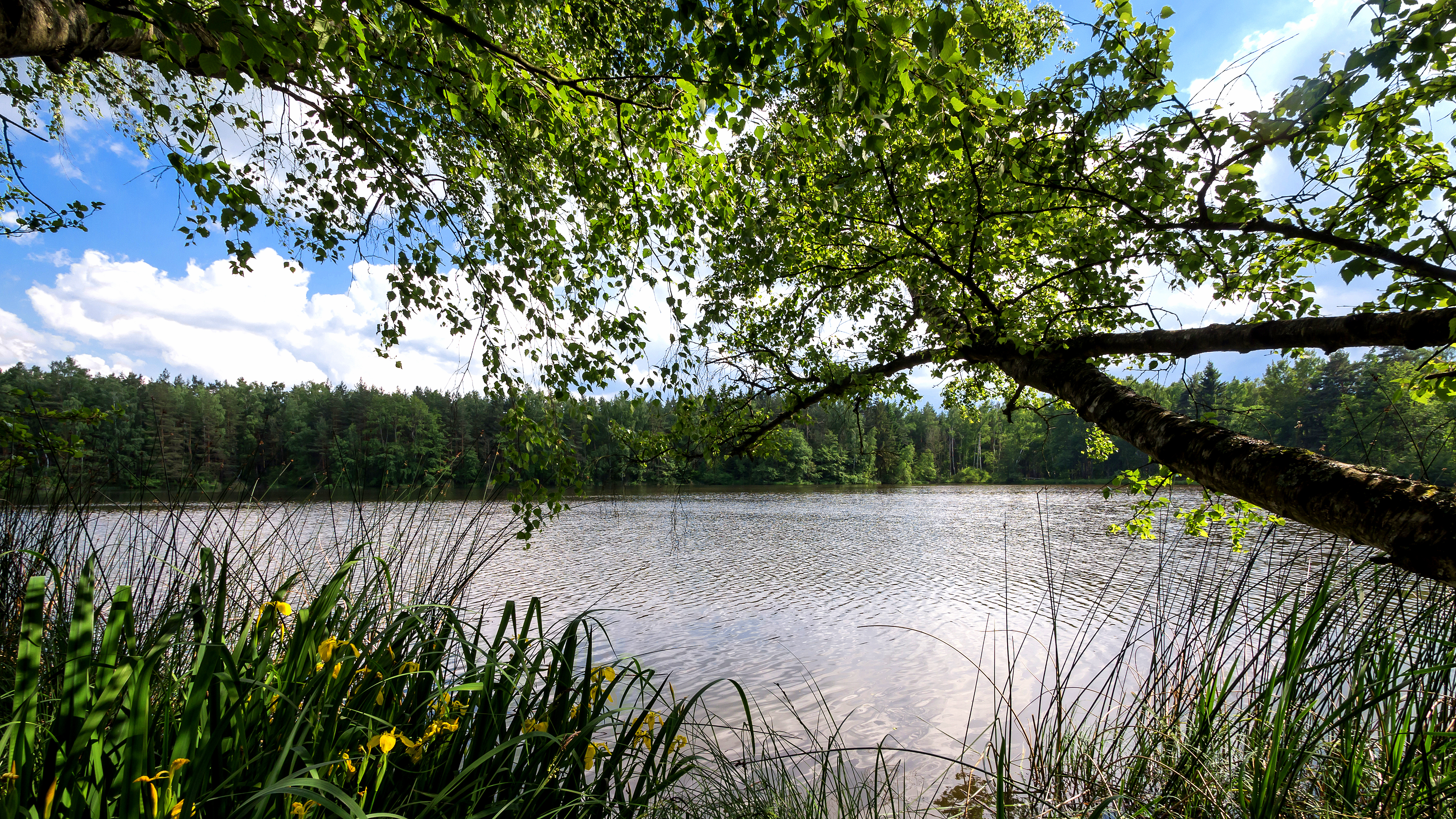 Zweizapfenteich in Pennewitz, gelegen im Naturschutzgebiet „Pennewitzer Teiche–Unteres Wohlrosetal“ und im gleichnamigen FFH-Gebiet